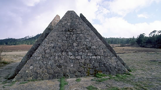 Las Pirámides, monumento (Pirámide Ciclópea) construido en homenaje al dictador Rafael Leonidas Trujillo Molina. Esta hace referencia donde se encuentra el centro de la Republica Dominicana